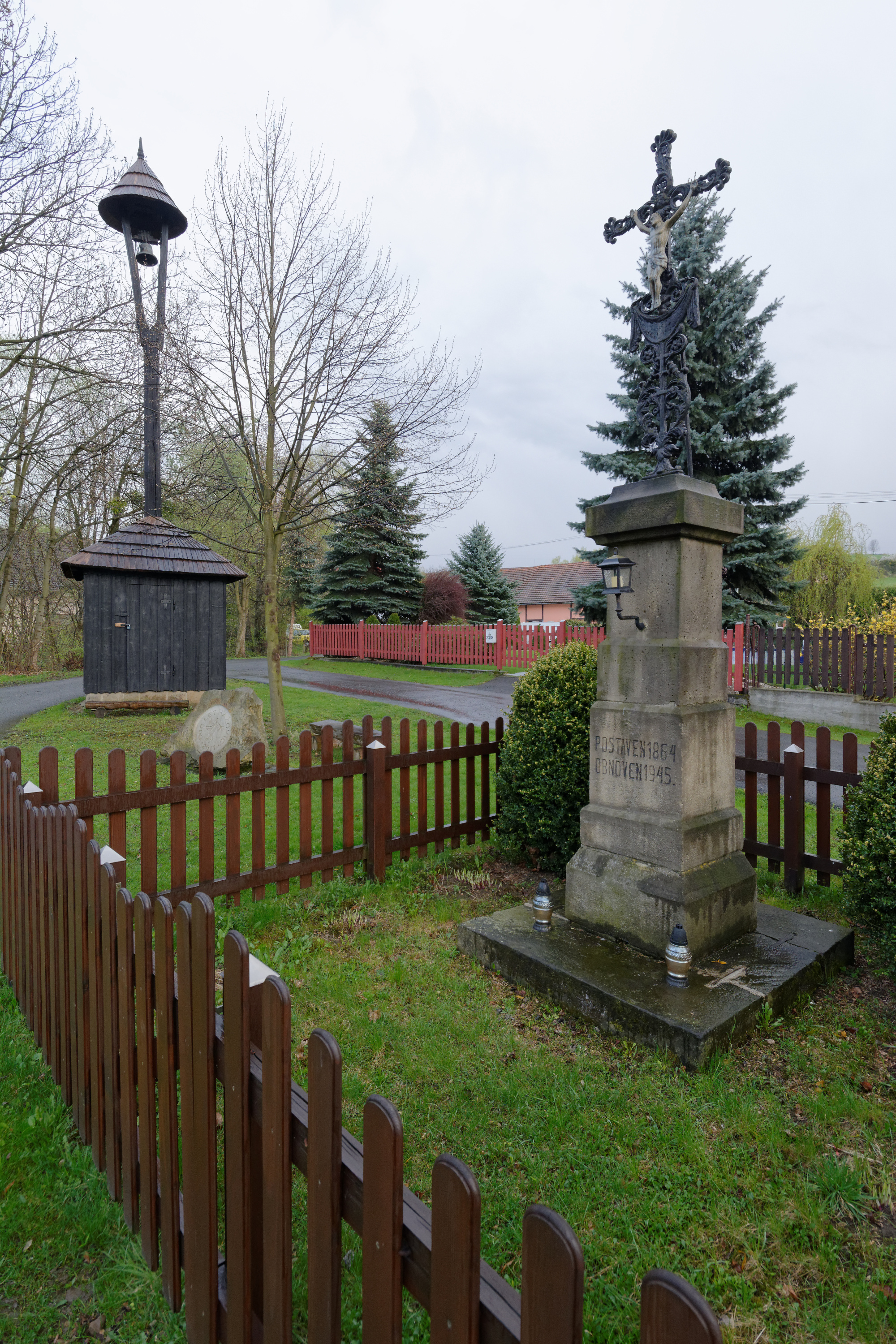 Hážovice, křížek a zvonička ve středu obce